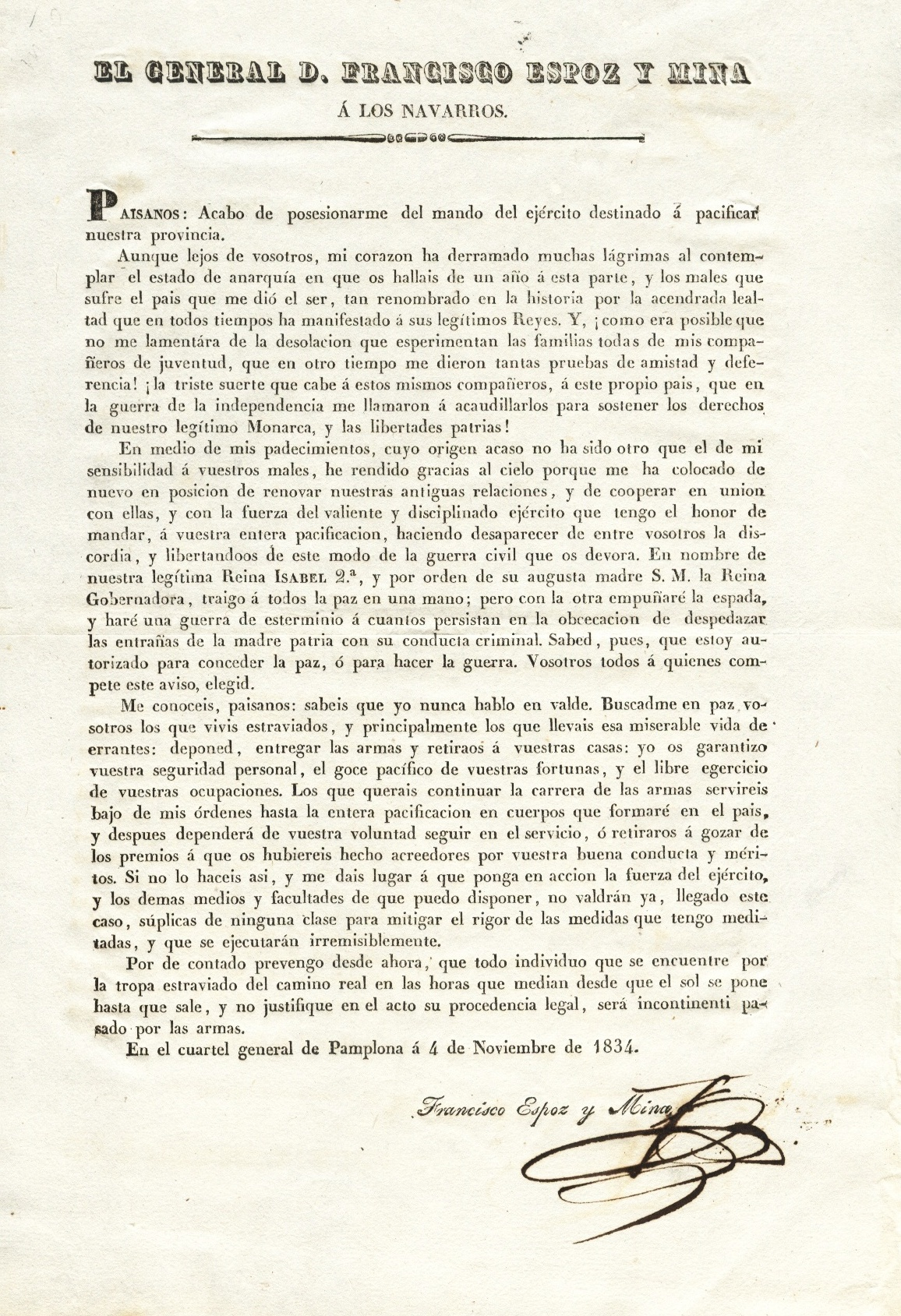 Alocución de Espoz y Mina. Pamplona, 4.11.1834